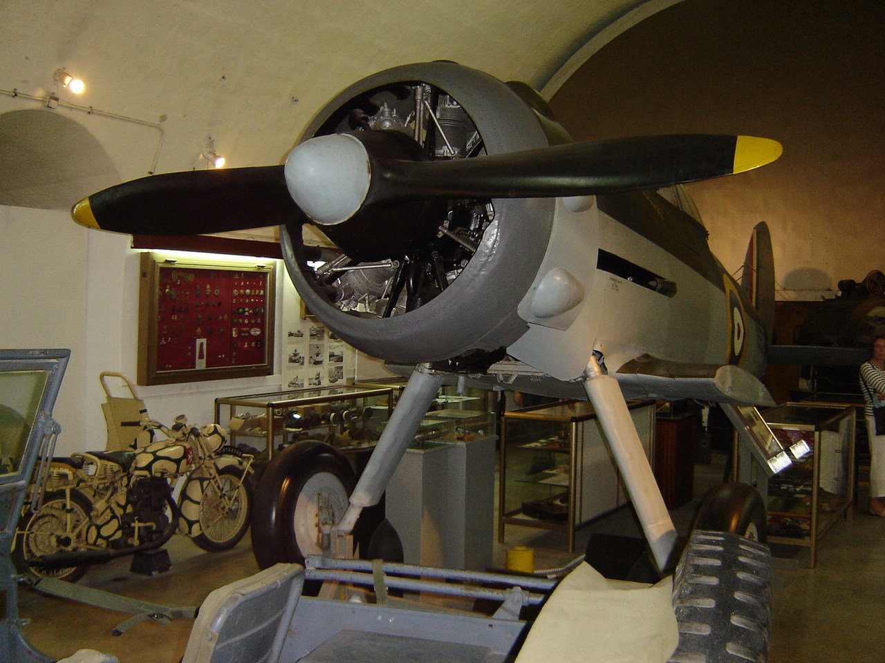 Gloster Gladiator, eigentlich ein Doppeldecker - Waffen und Kriegsmaterial aus dem 2. Weltkrieg, fotografiert in Malta April 2006. Genauere Deklaration benötigt, deshalb erst hier hochgeladen.